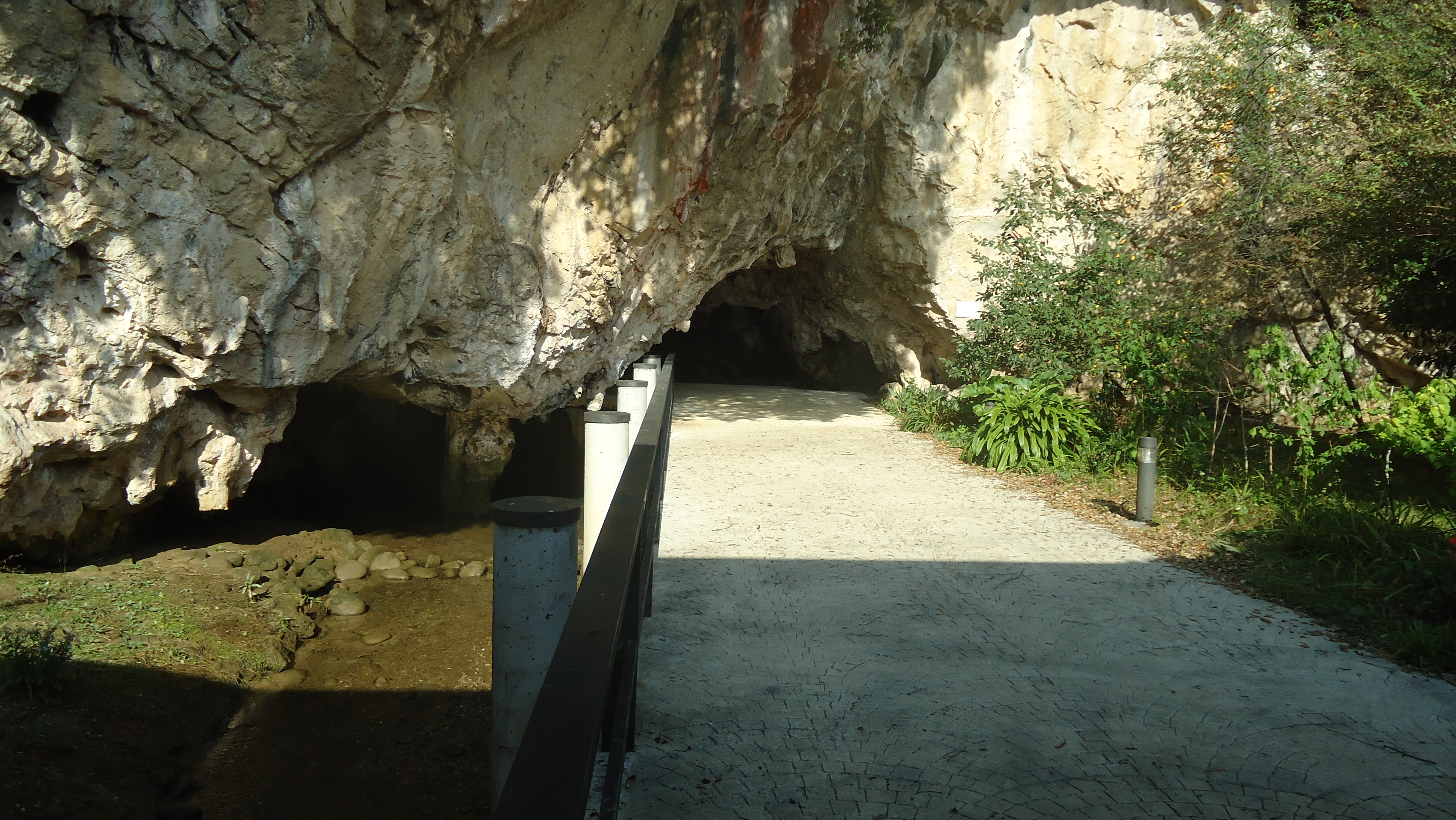 Entrada de la cueva del Tito Bustillo, Ribadesella, Asturias